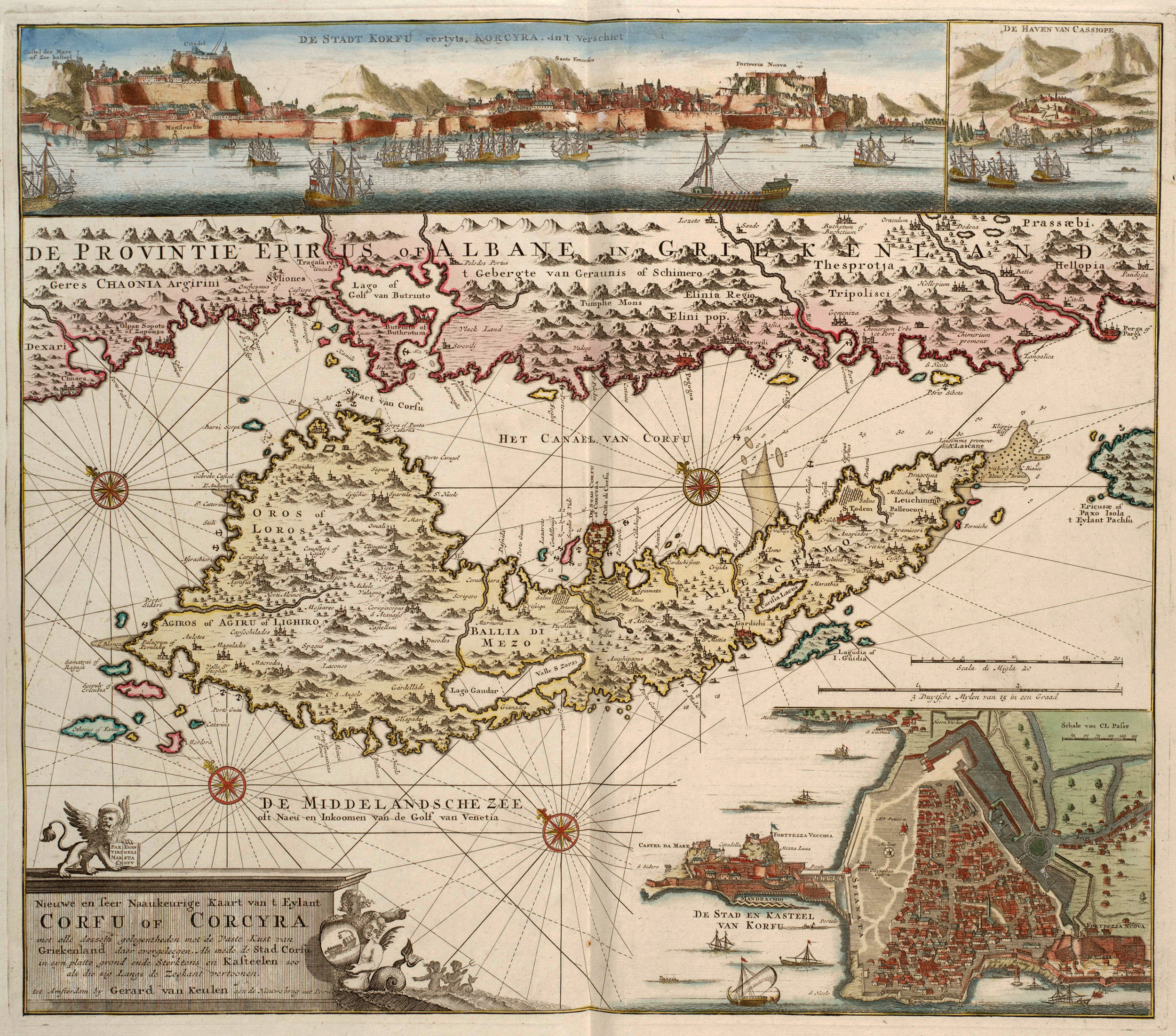 Χάρτης του Νησιού και της Πόλης Κέρκυρας και τα φρούριά της.